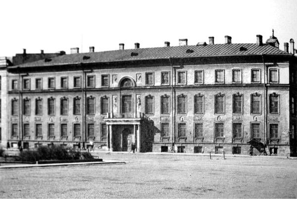 Вид на дом Мятлевых в Санкт-Петербурге 1900-х годов с Исаакиевской площади.